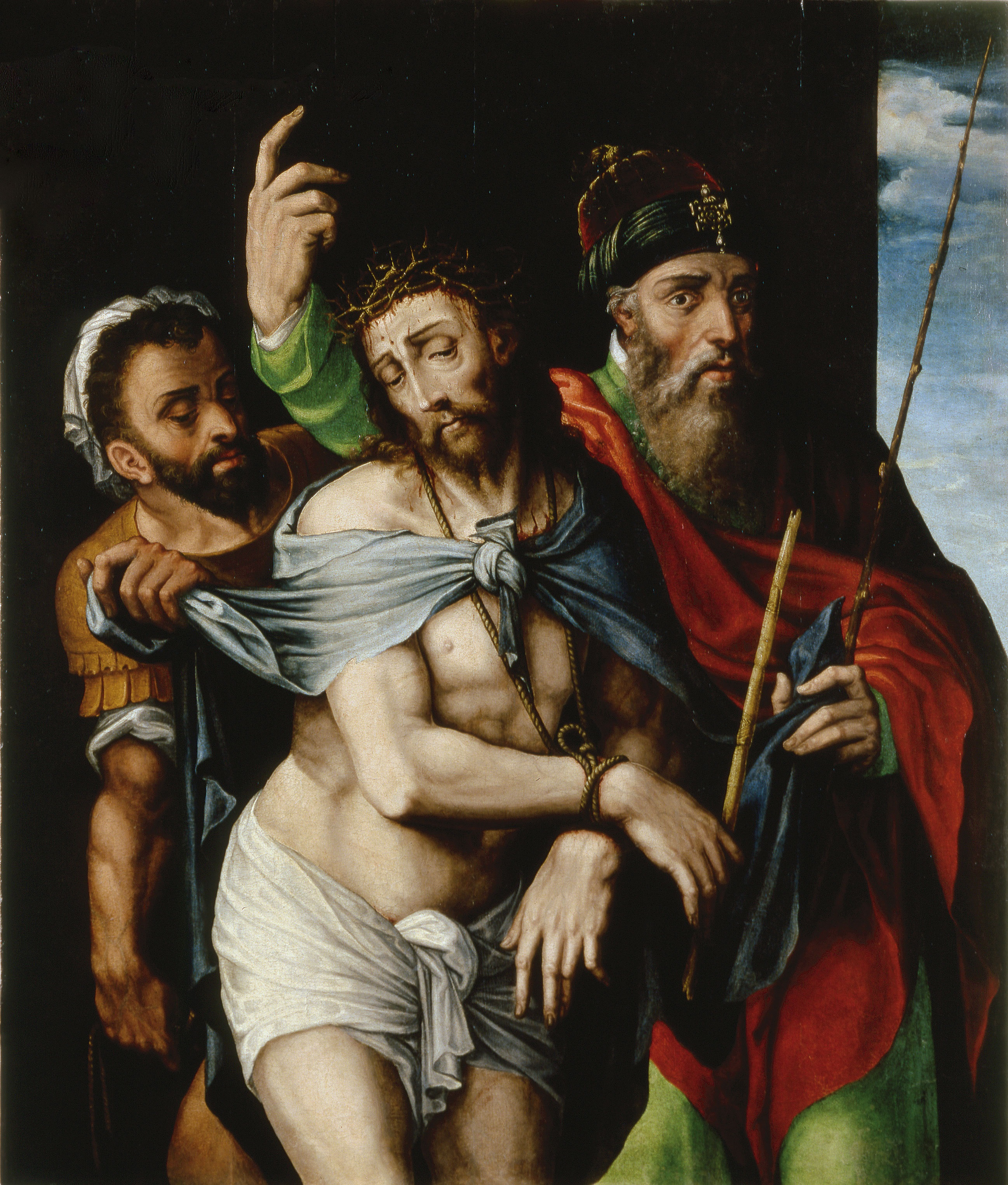 La obra representa a Jesucristo como Ecce homo.